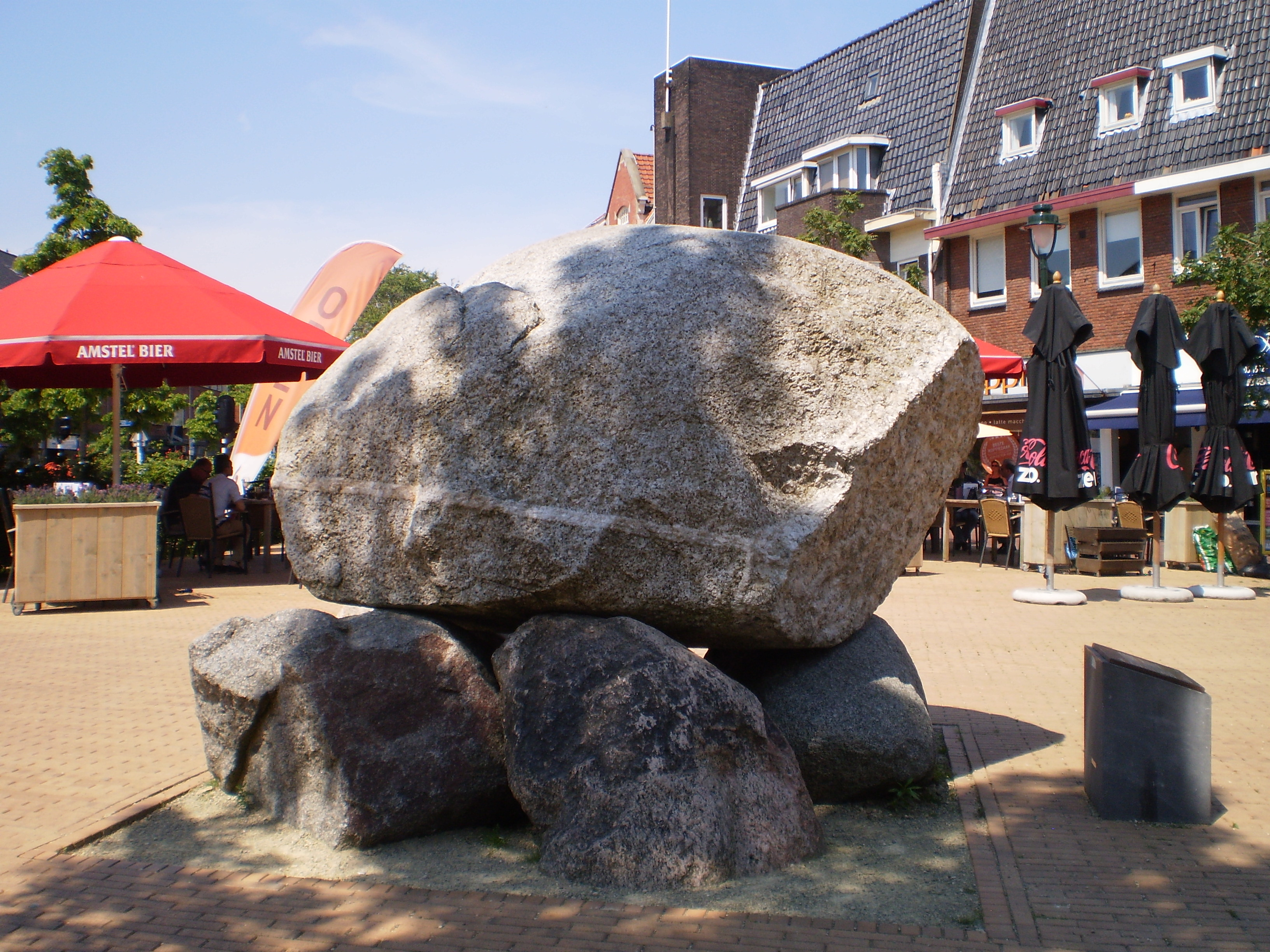 De Kei van Hilversum in 2015